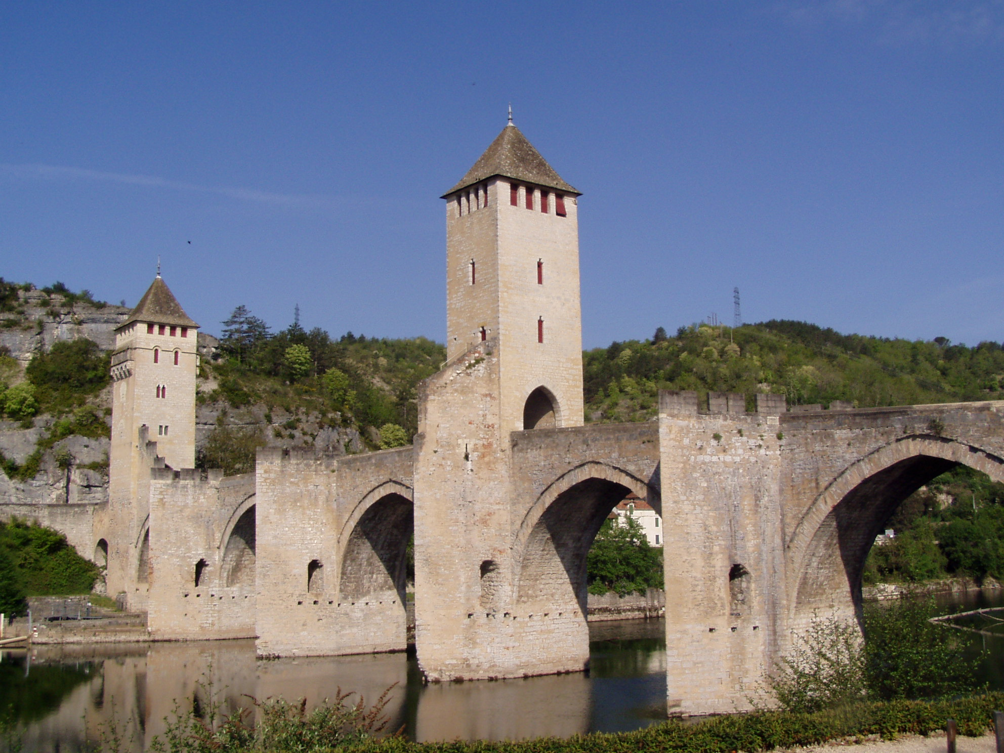 Photo du pont Valentré à Cahors prise par Accrochoc le 30 avril 2006